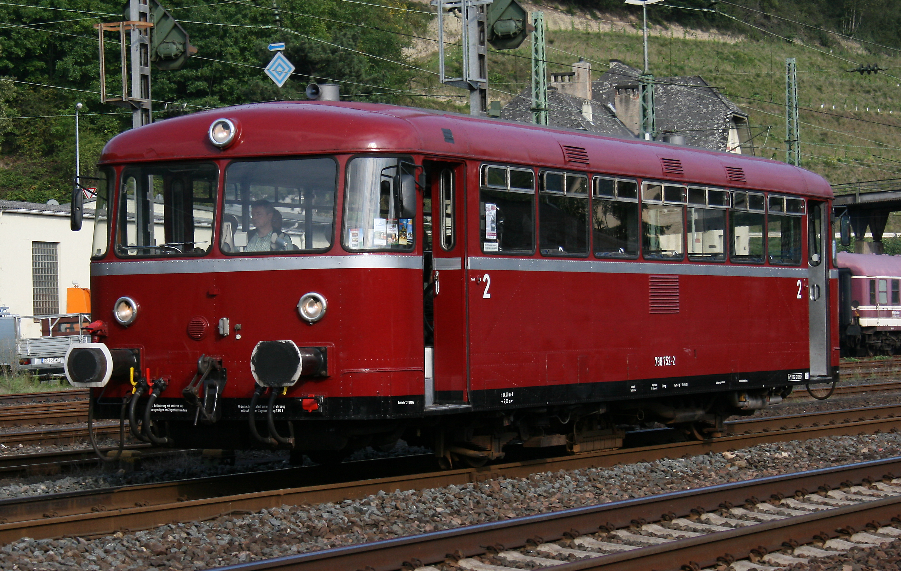 Der 798 752-2 der Baureihe 798 der Kasbachtalbahn hinter dem Linzer Bahnhof